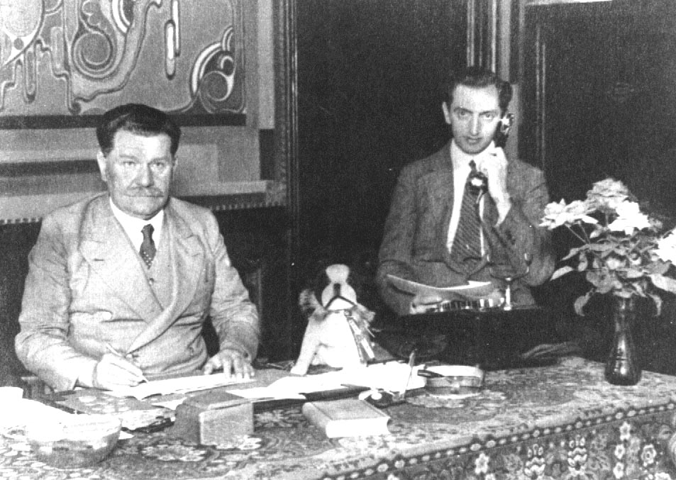 Directeur Alex Wunnink (L) van Theater Carré met zijn assistent Louis Dekker (R) in 1929 foto uit archief F. Meerlo. Publicatie met toestemming van auteur uit '100 jaar Carré'.